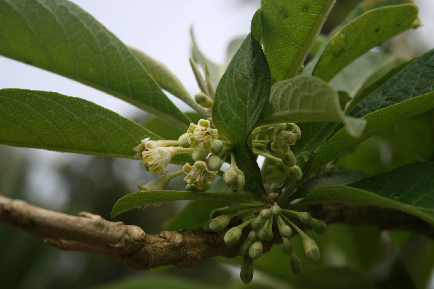 Acnistus arborescens, Nachtschattengewächse (Solanaceae) - Costa Rica: Prov. Cartago, Paraíso, Jardín Botánico Lankester/Lankester Botanical Garden